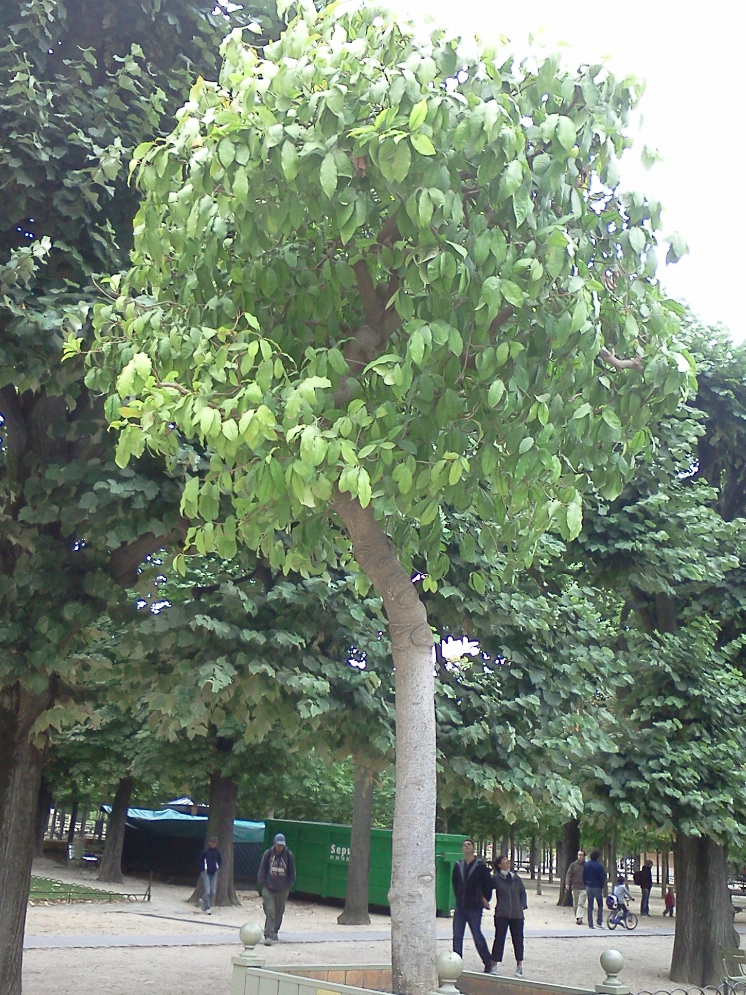 Olmediella betschleriana, une sorte d'arbre